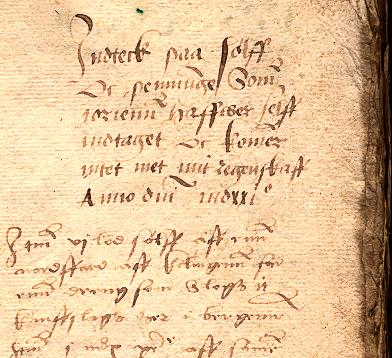 Side 1 av skattelista frå Jørgen Hansson, Bergen, anno 1521.